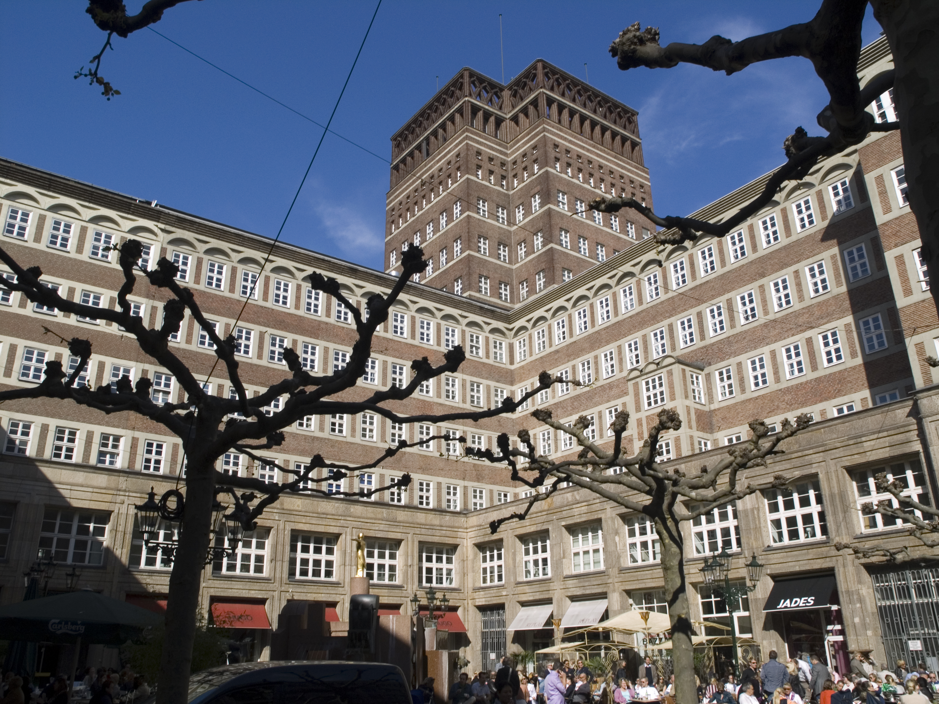 Северный Рейн-Вестфалия, Дюссельдорф - "Дом Вильгельма Маркса"